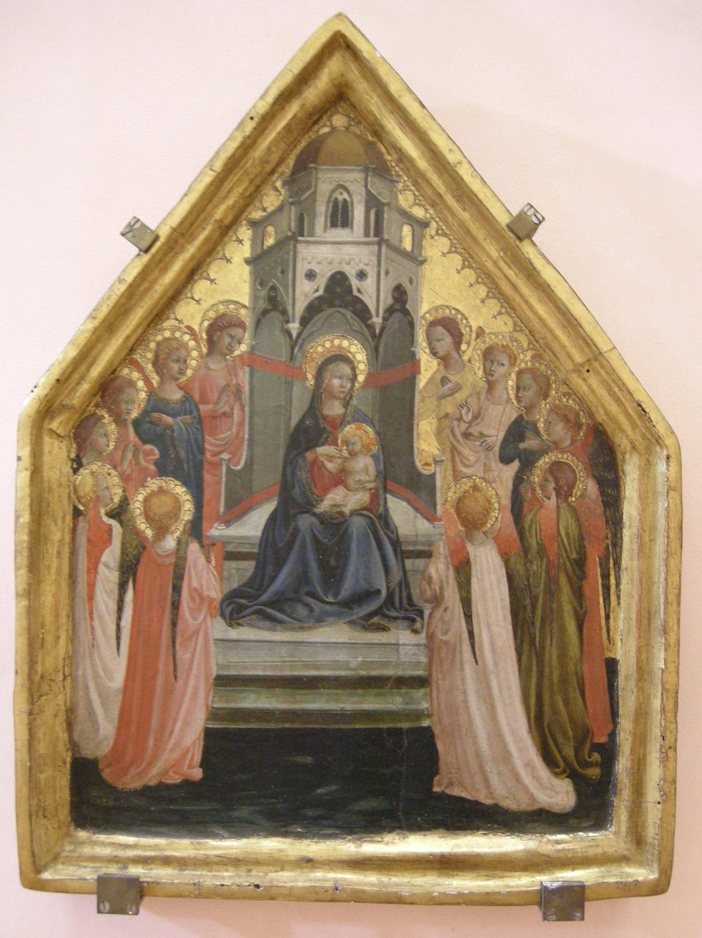 Andrea di giusto manzini, maestà con dodici angeli